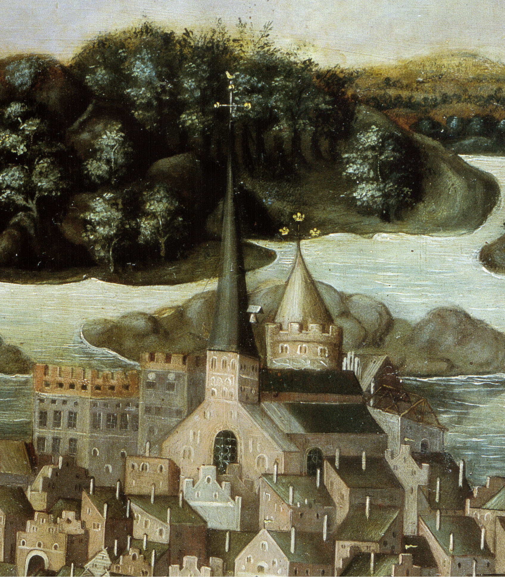 Detail from Vädersolstavlan showing Storkyrkan and Tre kronor (castle).